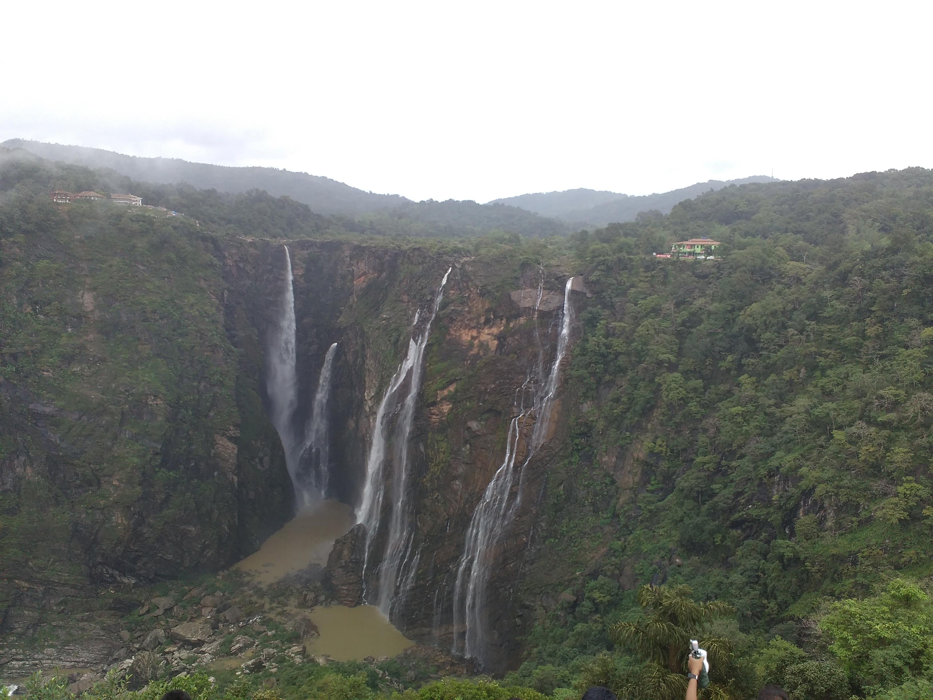 ಕನ್ನಡ: ಭಾರತದ ಎರಡನೆಯ ಅತಿ ಎತ್ತರದ ಜಲಪಾತ